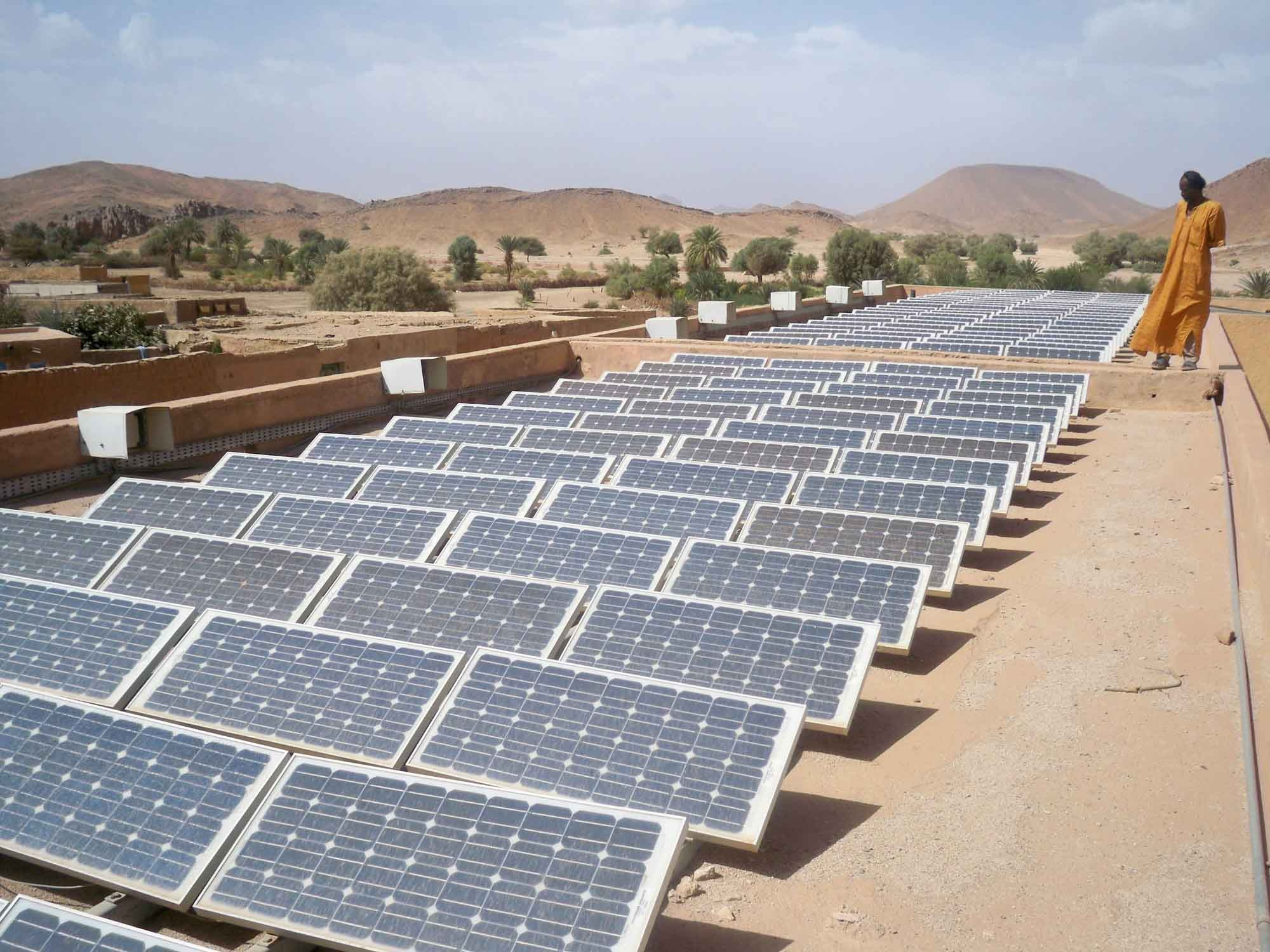 Les autorités algériennes espèrent que l'énergie solaire et éolienne permettra au pays de sortir de sa dépendance envers les énergies fossiles.